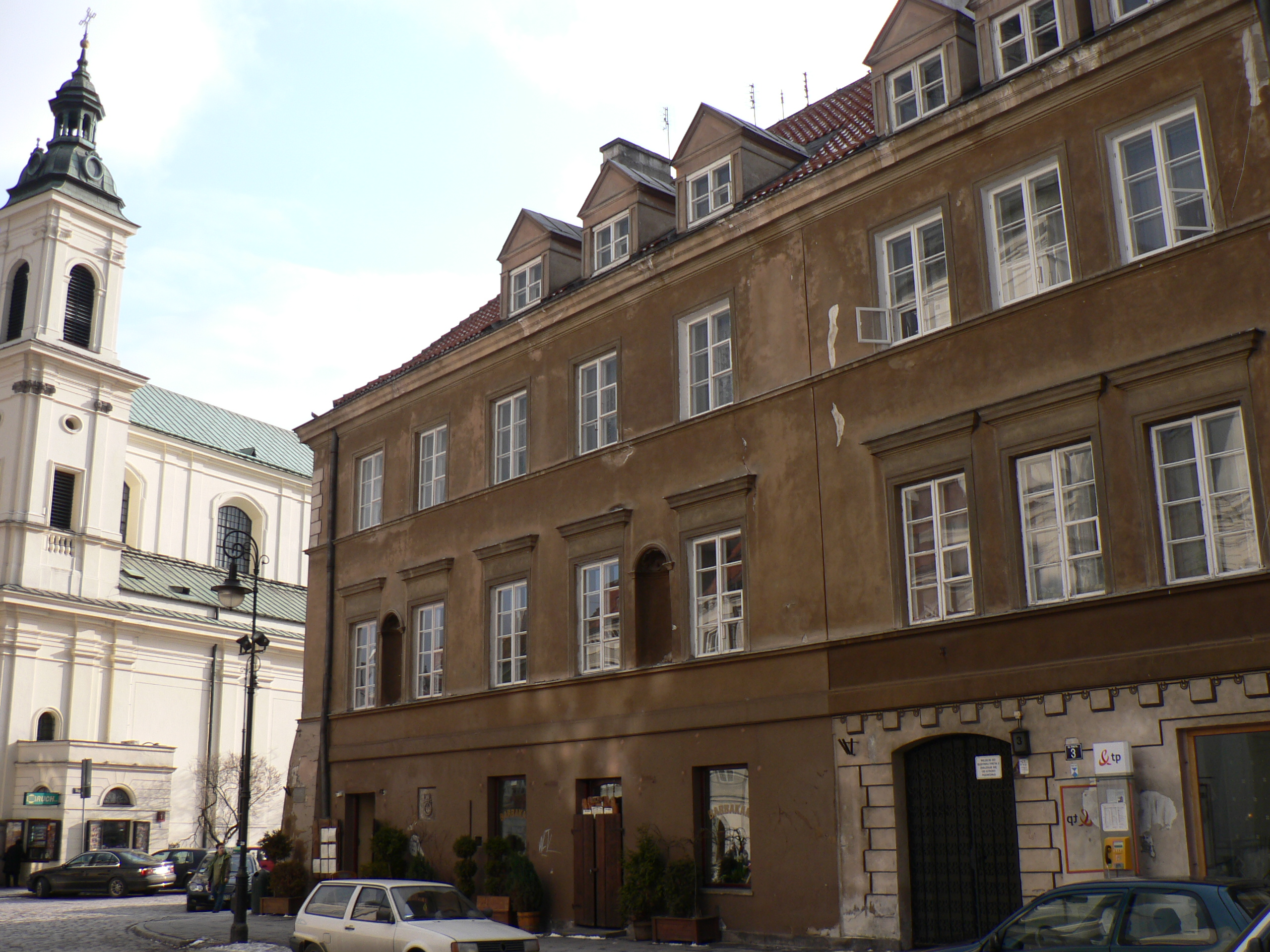 Warszawa, ul. Freta, z lewej kościół św. Ducha